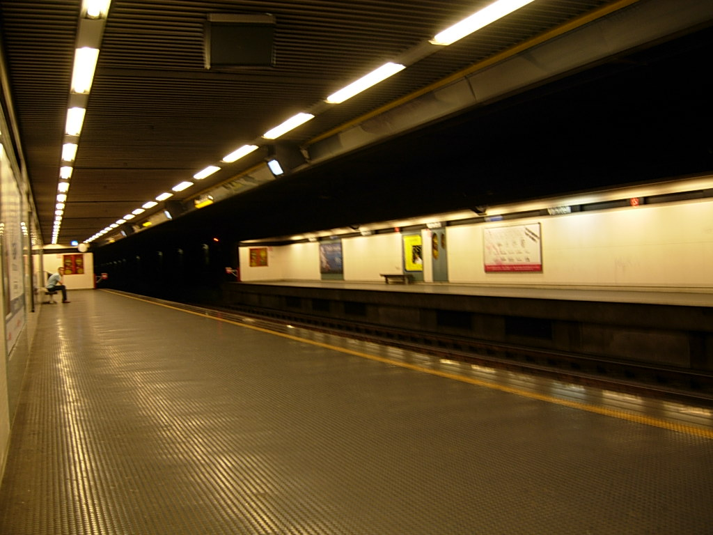 Stazione Vanvitelli Metropolitana di Napoli - Linea 1 Foto personale Concessa in Pubblico Dominio